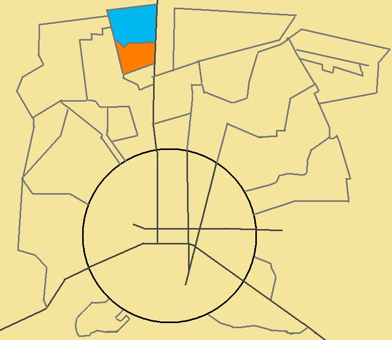 Localização do bairro Novo Horizonte em mapa artesanal dos limites dos bairros ao norte da região central de Feira de Santana, Bahia, Brasil. O campus universitário da Universidade Estadual de Feira de Santana está em laranja e o resto do bairro, em azul.